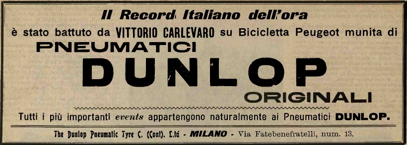 Werbung mit Vittorio Carlevaro, ital. Radsportler (1882-1905)